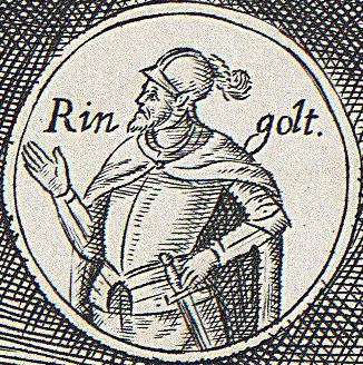 Беларуская (тарашкевіца): Уяўны партрэт легендарнага князя Рынгольда (Ryngold)